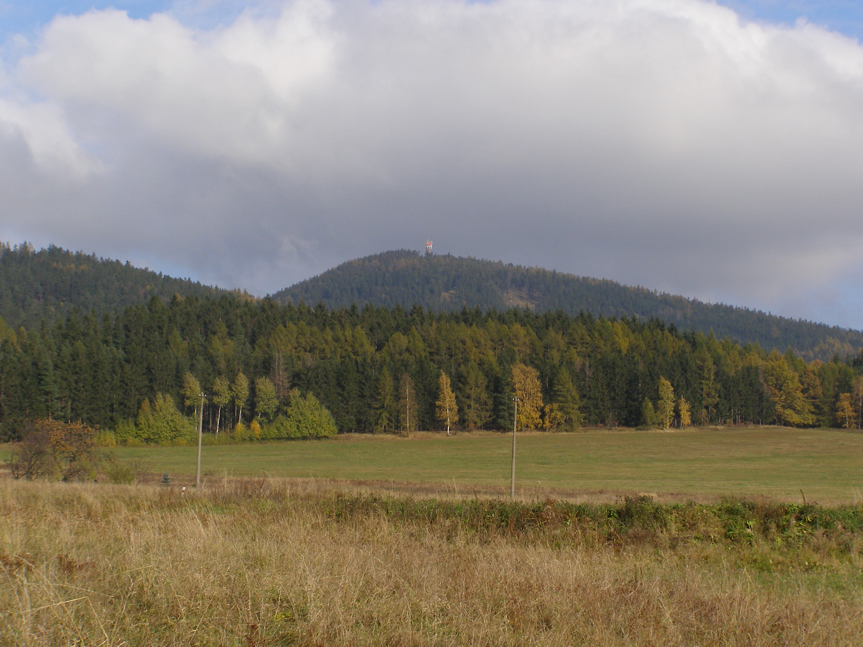 Ruprechtický Špičák (Javoří hory)